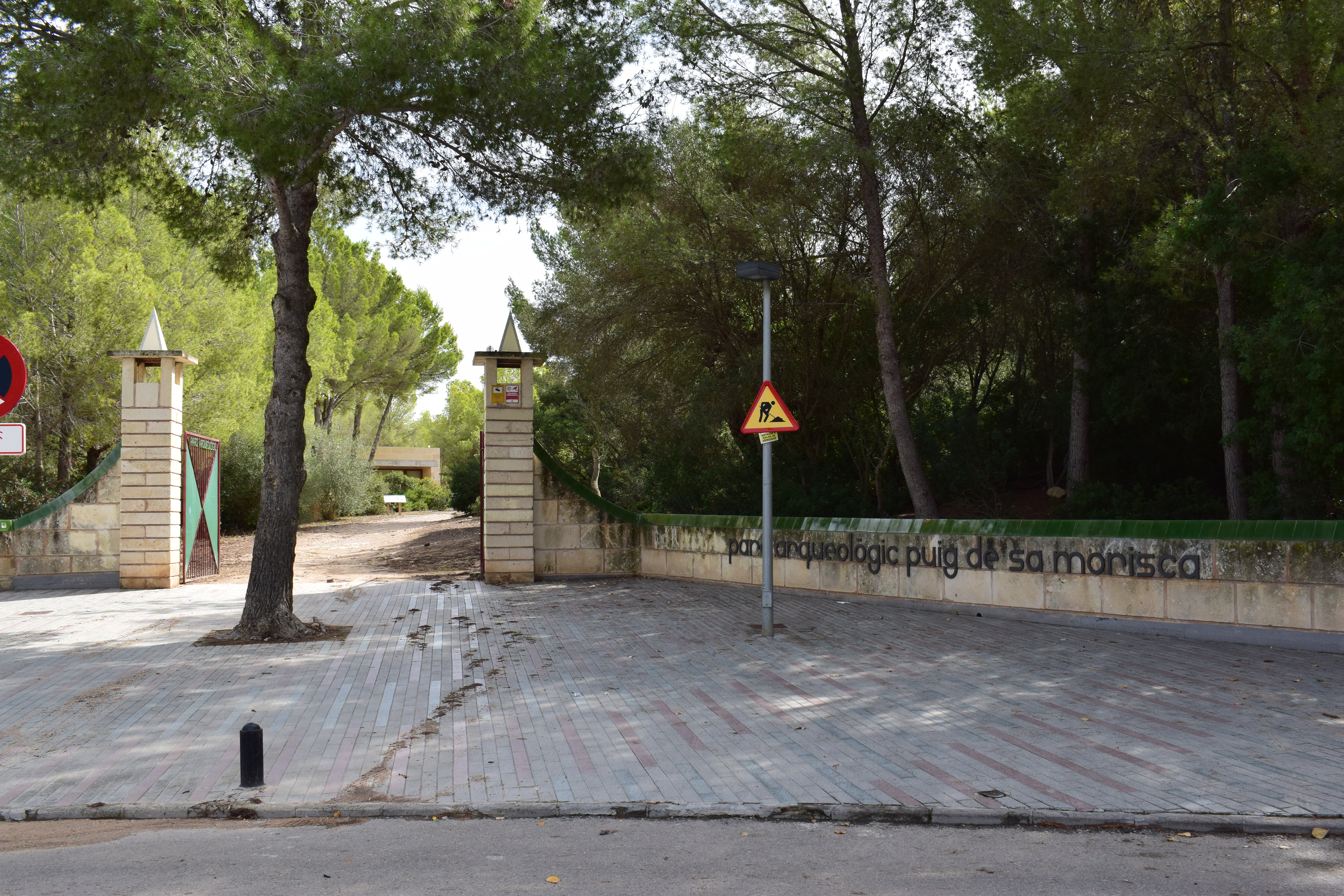 Eingangstor des Archäologischen Parks Puig de sa Morisca in Santa Ponça, Mallorca, Spanien.